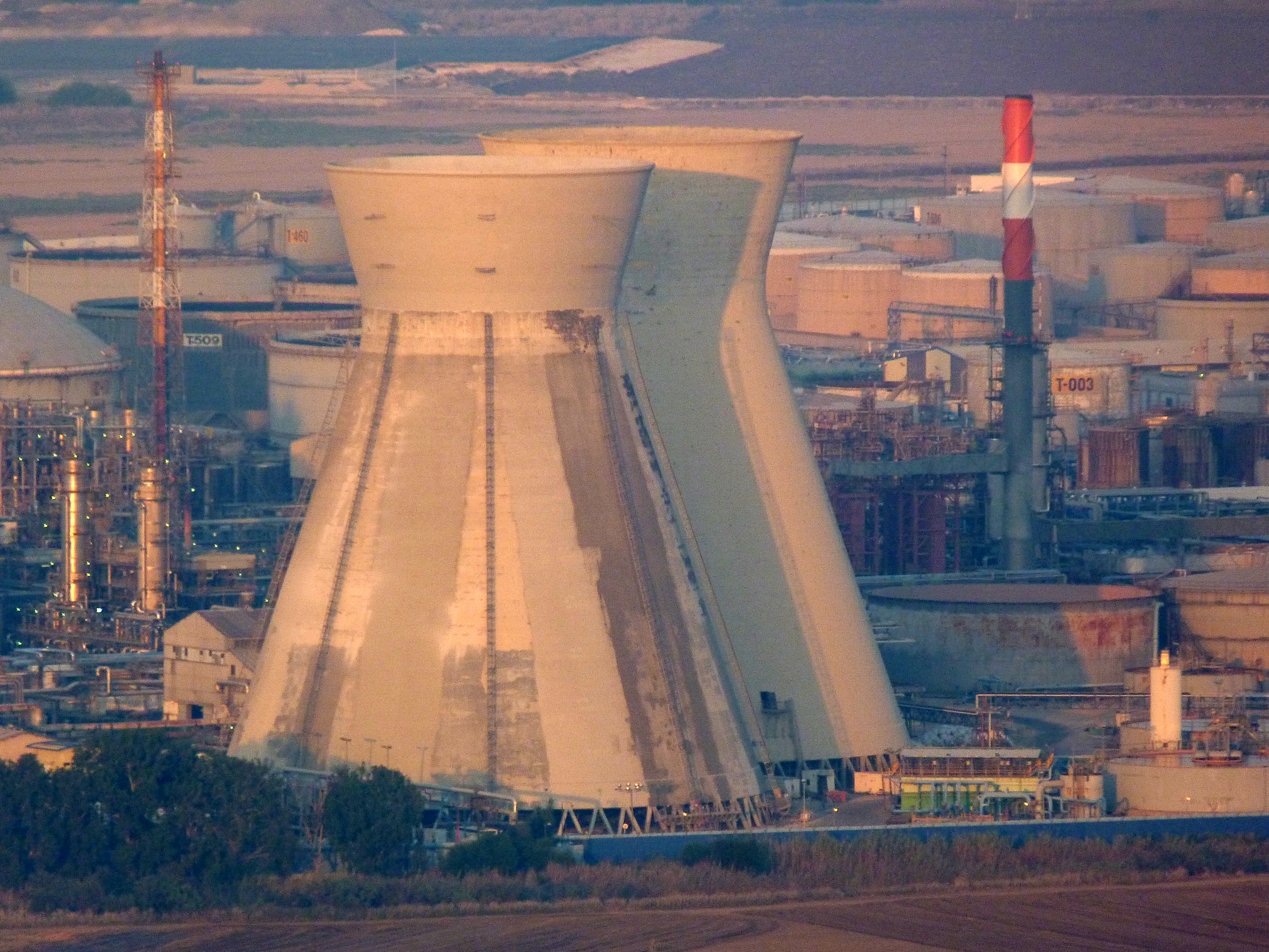 הלבניות, מתחם בז"ן, מפרץ חיפה